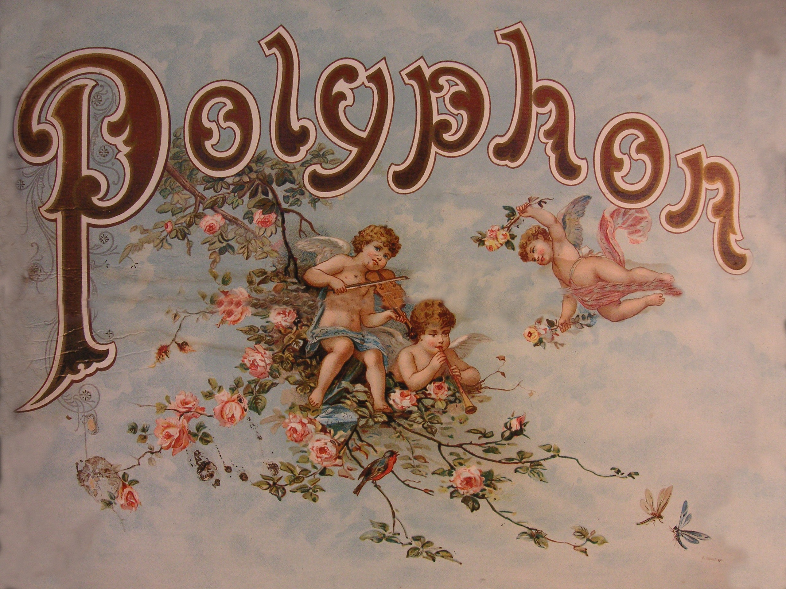 Polyphon Spieldose, Deckbild